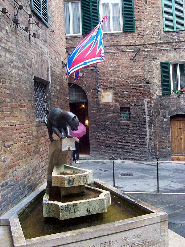 Siena - Fontana della Pantera